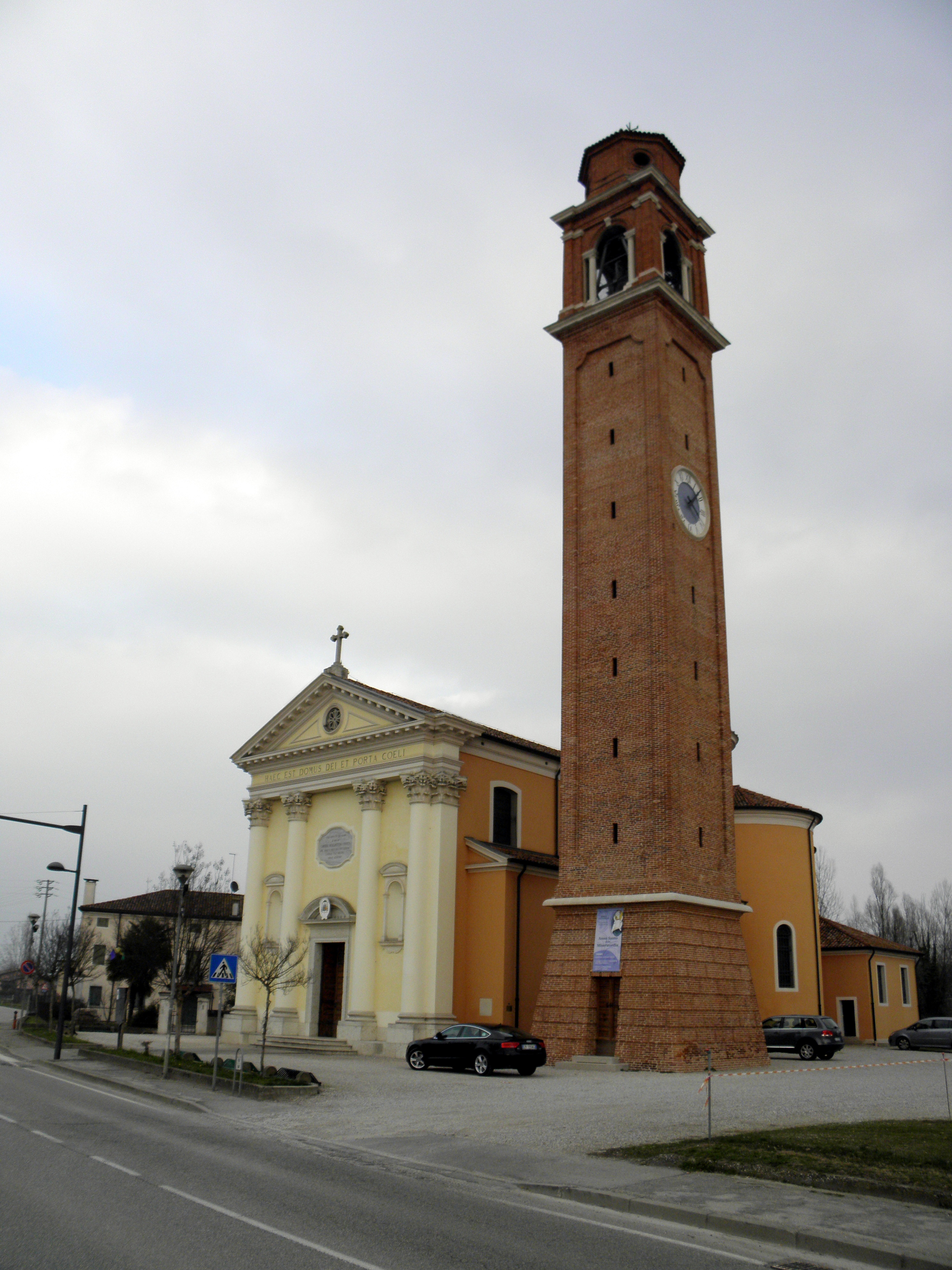 Sant'Ambrogio, frazione di Trebaseleghe: la chiesa parrocchiale di Sant'Ambrogio Vescovo e Dottore.